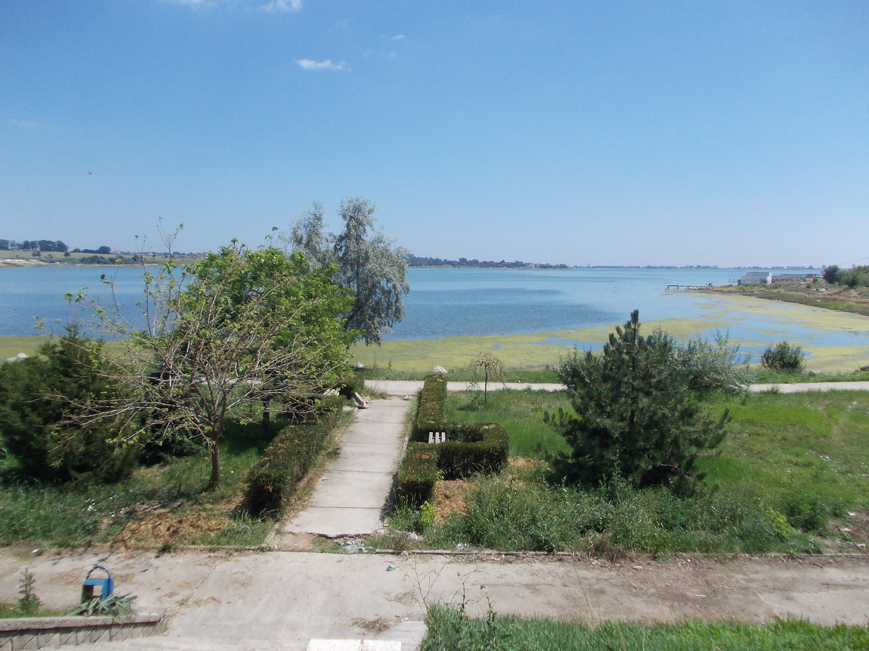 Lacul Techirghiol